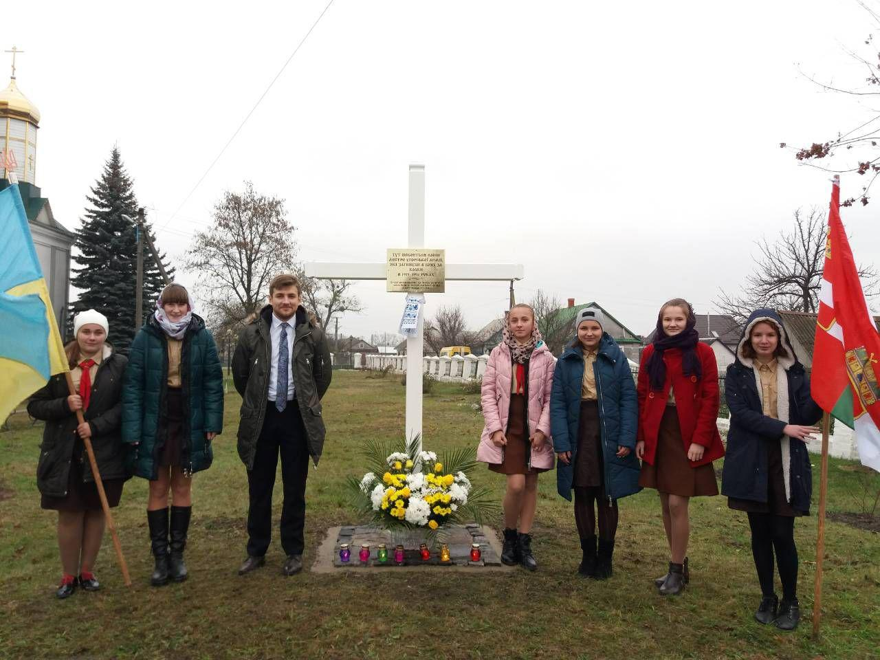 11 листопада 2018 року під час відкриття пам'ятного знаку. Члени місцевого Пласту і ініціатор події.